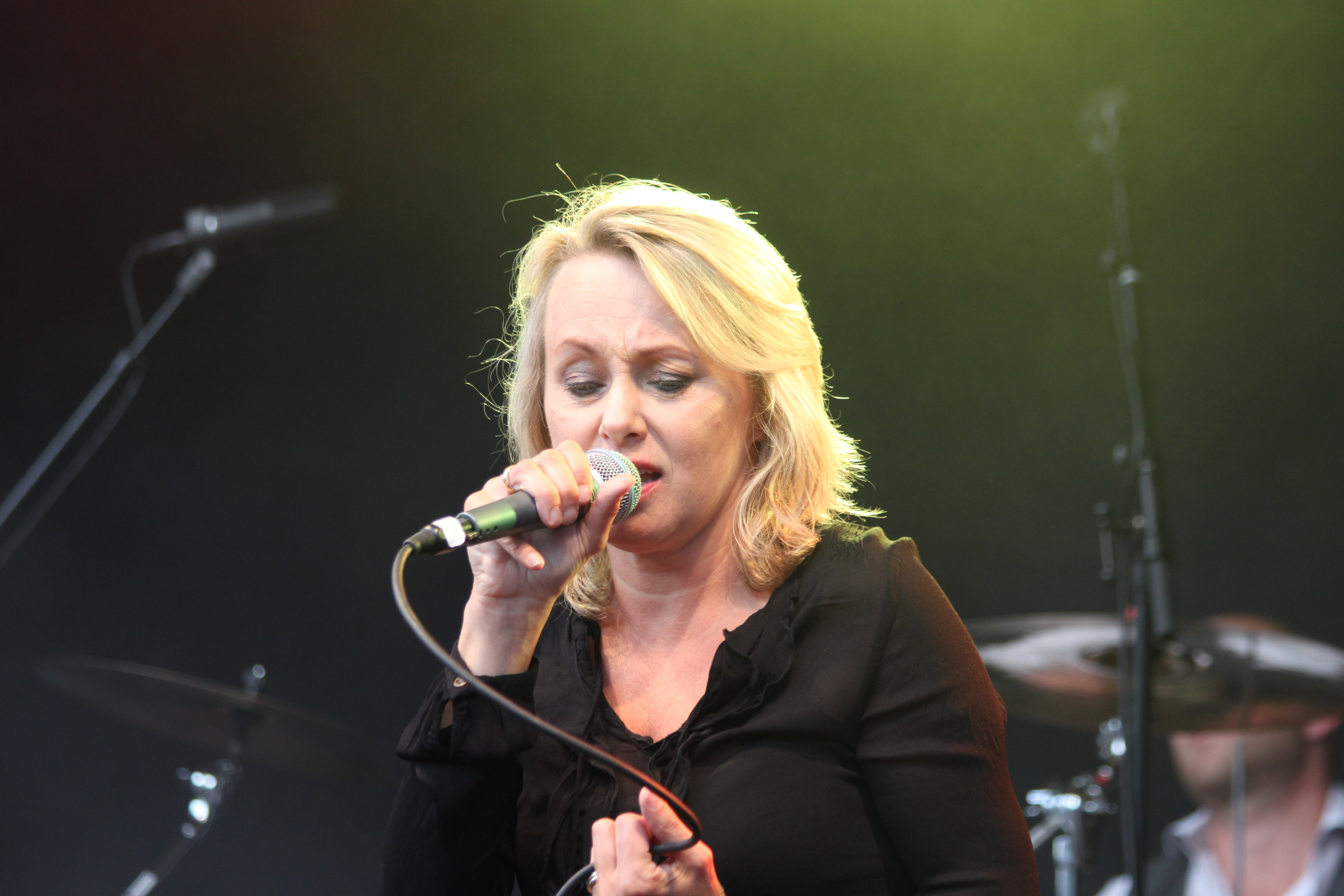 Louise Hoffsten live i Södertälje. 4 juli 2013.